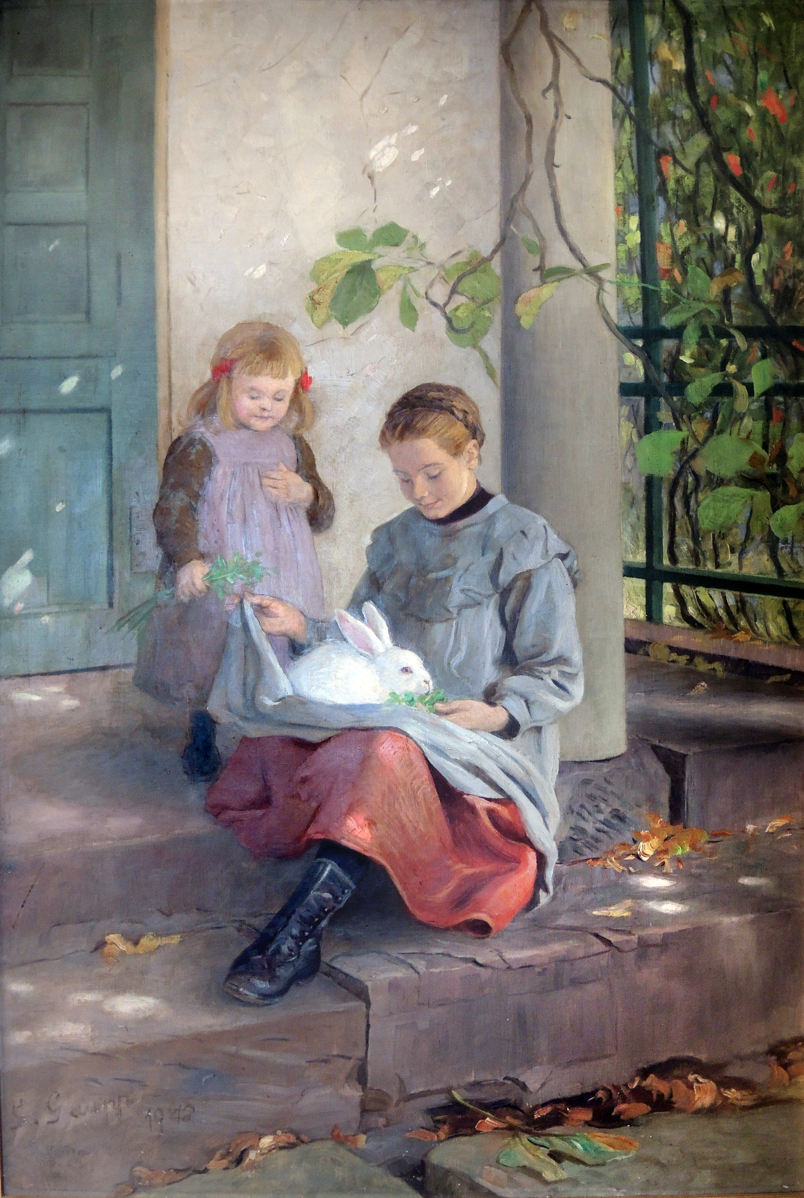 Mädchen mit weißem Hase